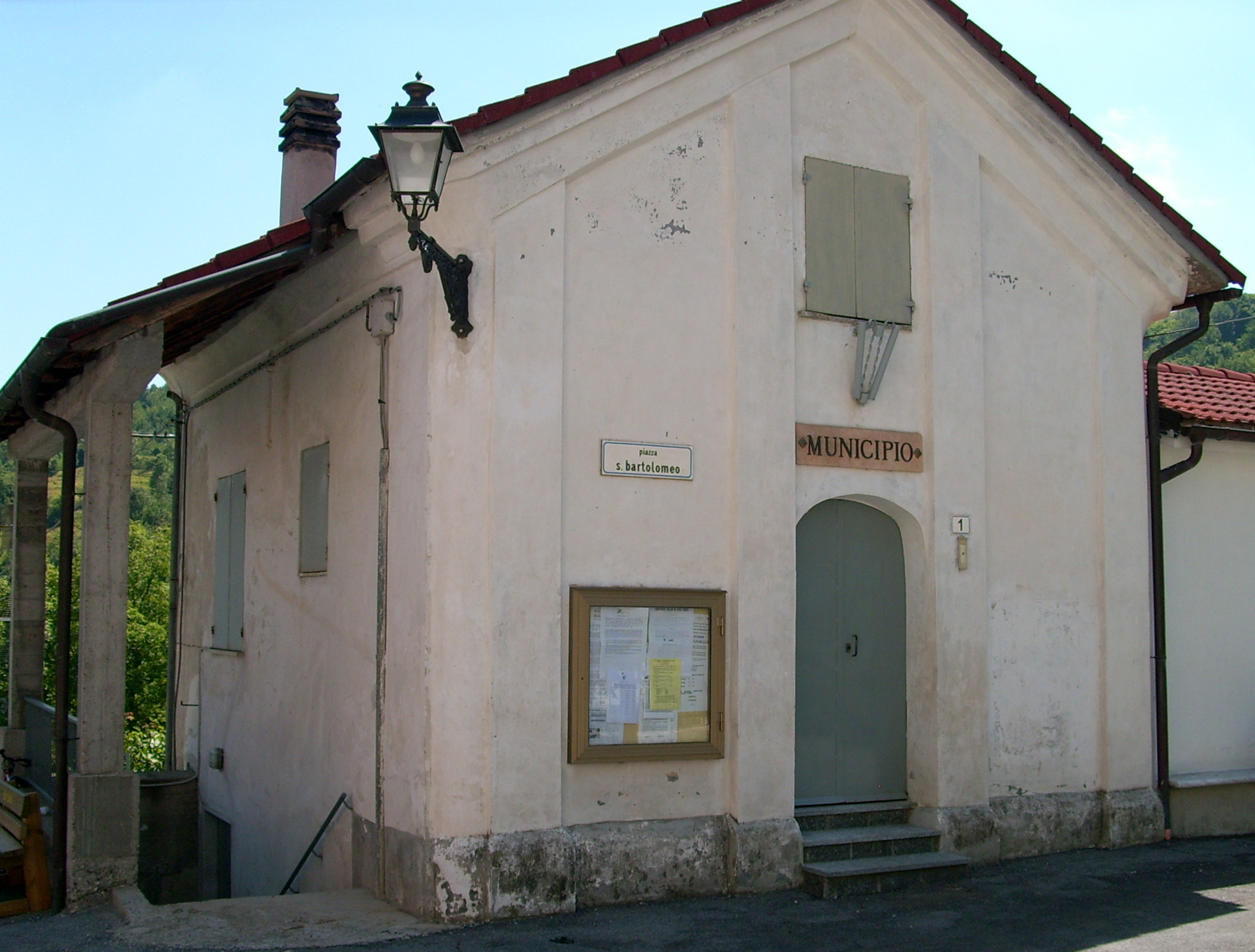 Municipio di Rondanina, Liguria, Italia